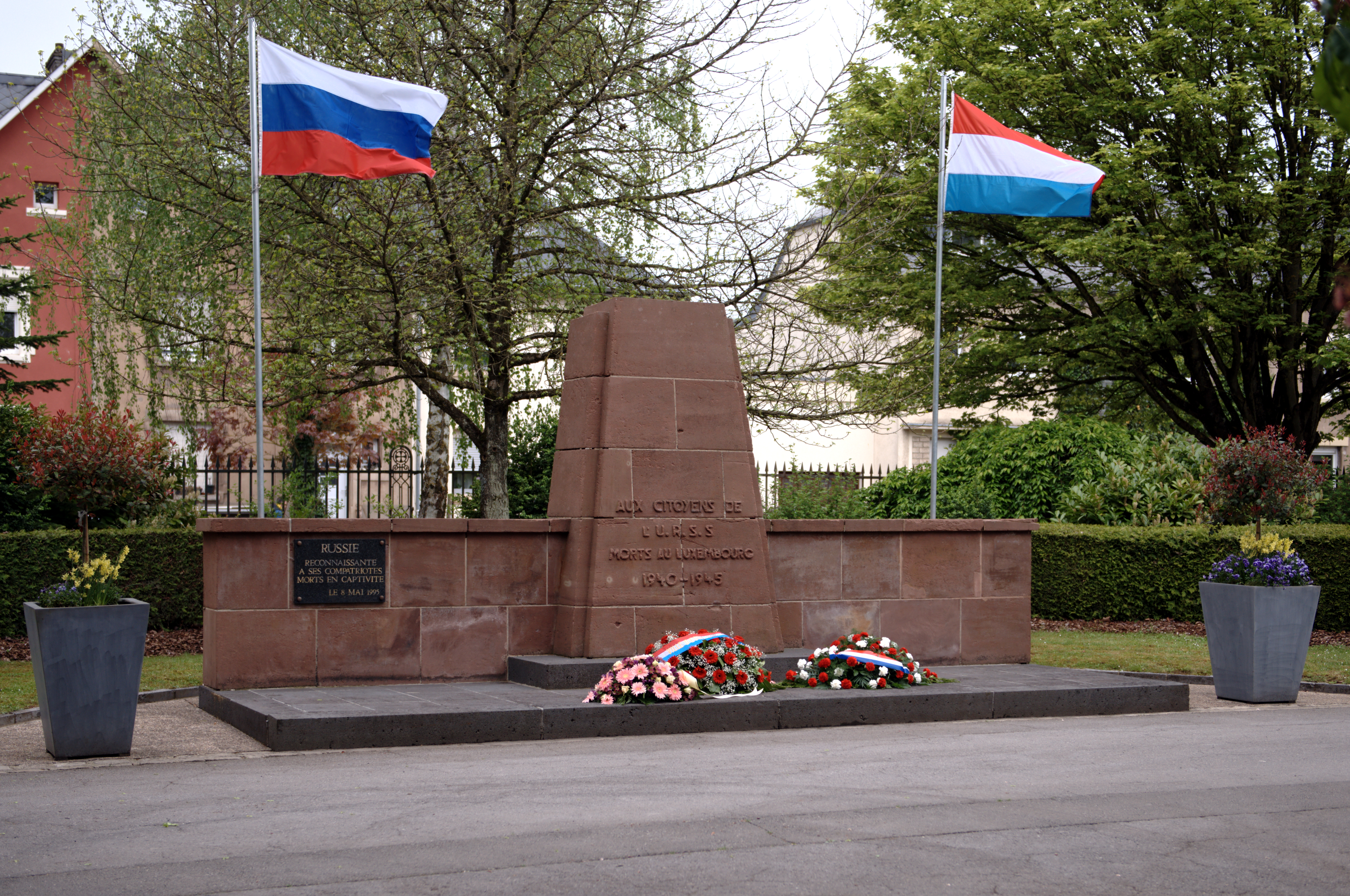 D'Sowjetescht Éieremonument um Lallenger Kierfecht.